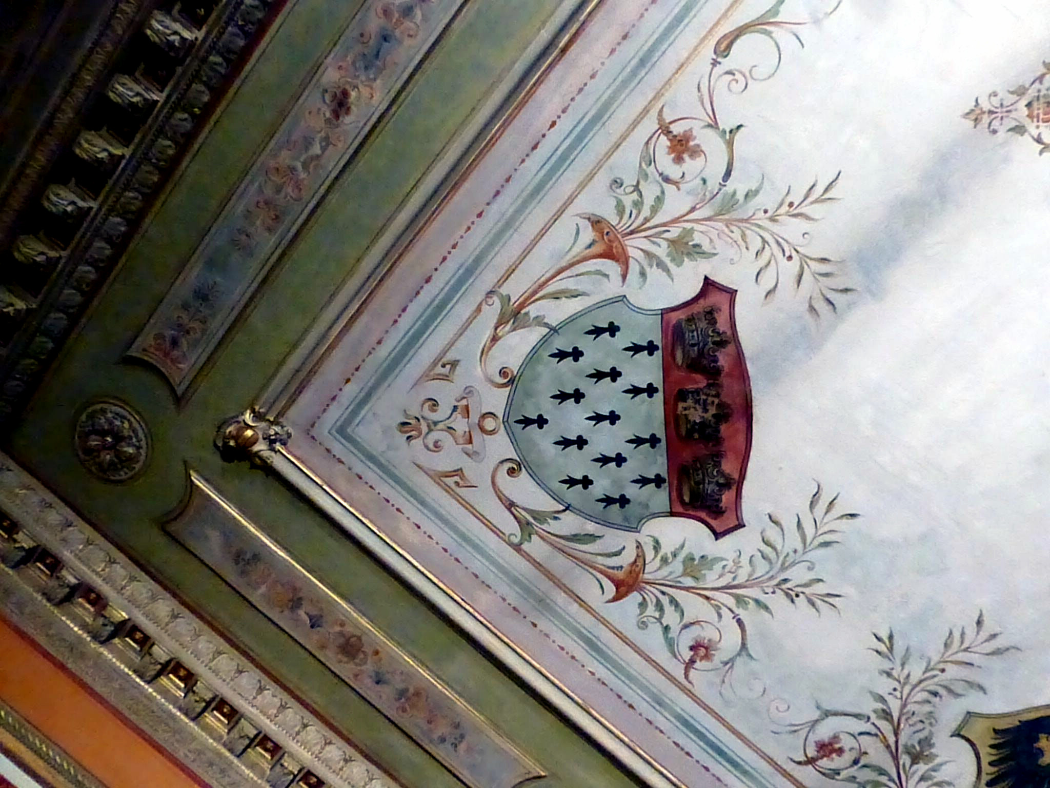 Festsaal der Köln-Rottweiler Pulverfabrik; Fehlerhaftes Kölner Wappen